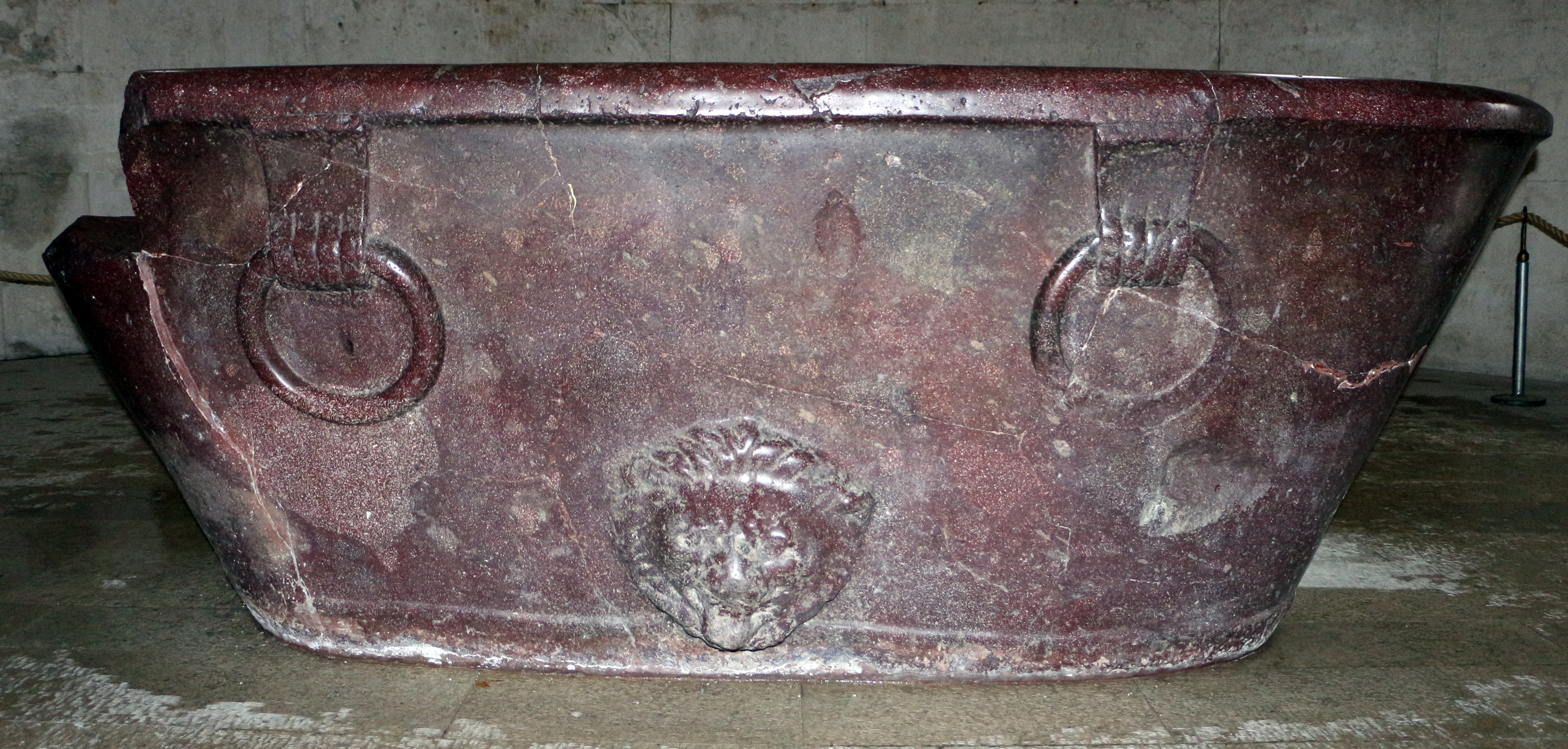 Mausoleo di Teodorico This is a photo of a monument which is part of cultural heritage of Italy.